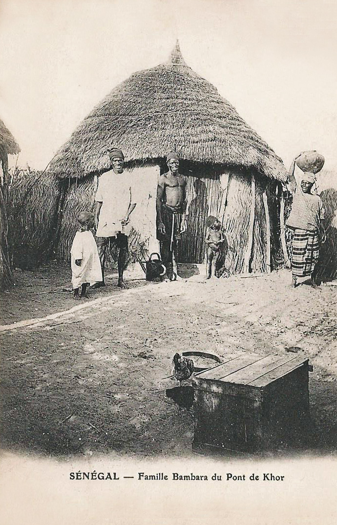 Sénégal. Famille Bambara du Pont de Khor. [Pont-de-Khor, ou Pont-Khor, ou Béthesda, fondé par un missionnaire protestant dans la région de Saint-Louis, accueillant les Bambaras réfugiés au Sénégal] Sans indication d'auteur, d'éditeur ou de date, ni au recto ni au verso.